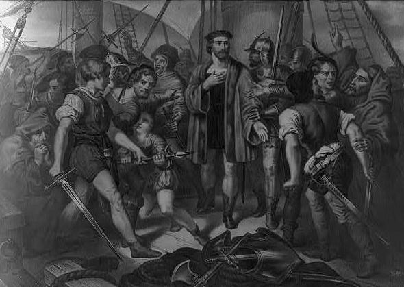 Cristobal Colon apaciguando una rebelion a bordo.